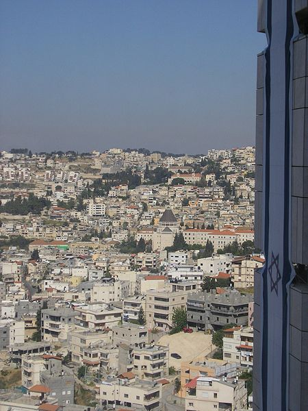 העיר נצרת כפי שהיא נראית מהיכל המשפט בנצרת עילית. צולם על ידי